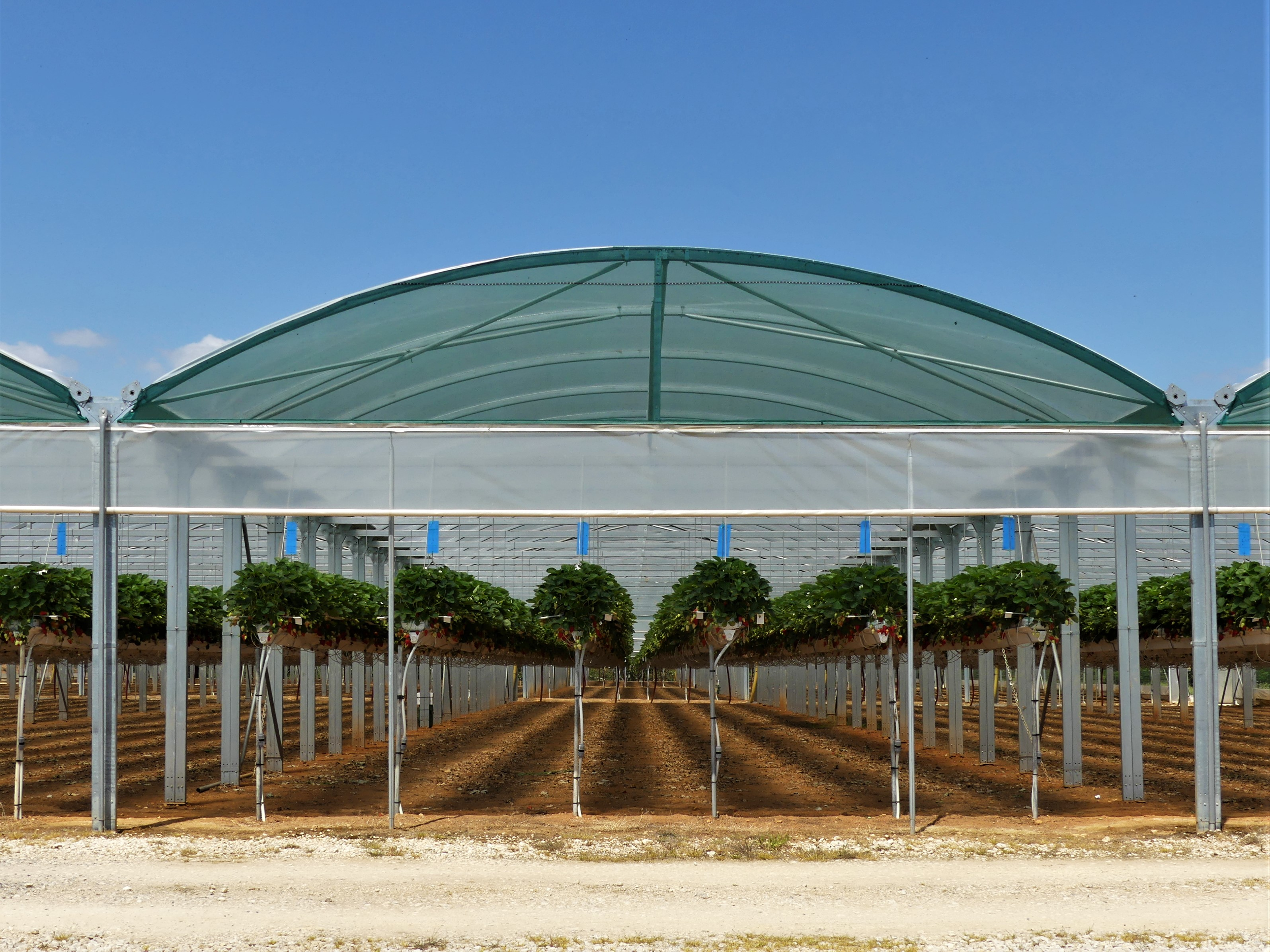 Fraisiculture hors-sol à Beauregard-et-Bassac, Dordogne, France.